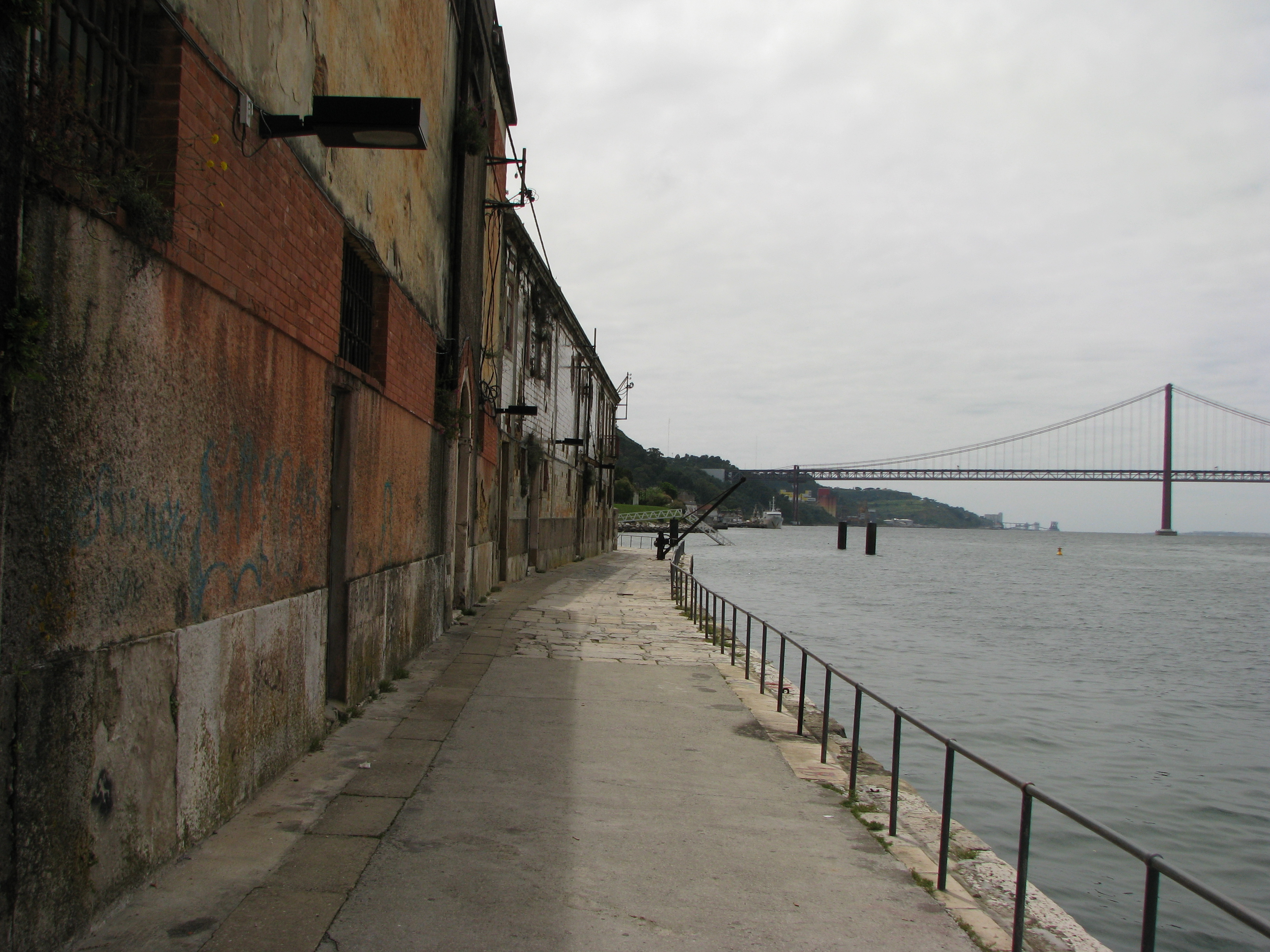 Paseo de Cacilhas